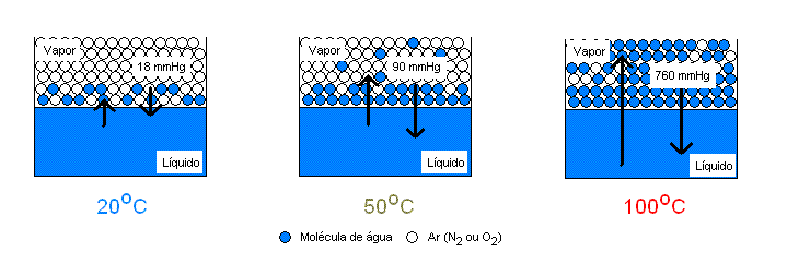 EsboÃ§o do equilÃ­brio lÃ­quido-vapor da Ã¡gua ao nÃ­vel do mar. O aumento de temperatura aumenta a taxa de vaporizaÃ§Ã£o, mas enquanto a pressÃ£o parcial exercida pelo vapor d'Ã¡gua for menor do que a pressÃ£o total, a taxa de condensaÃ§Ã£o aumenta de forma compensatÃ³ria, de maneira que reestabelece-se o equilÃ­brio dinÃ¢mico. Quando a temperatura atinge 100 graus Celsius, a taxa de vaporizaÃ§Ã£o vence a taxa de condensaÃ§Ã£o: ocorre assim a mudanÃ§a de fase da Ã¡gua.